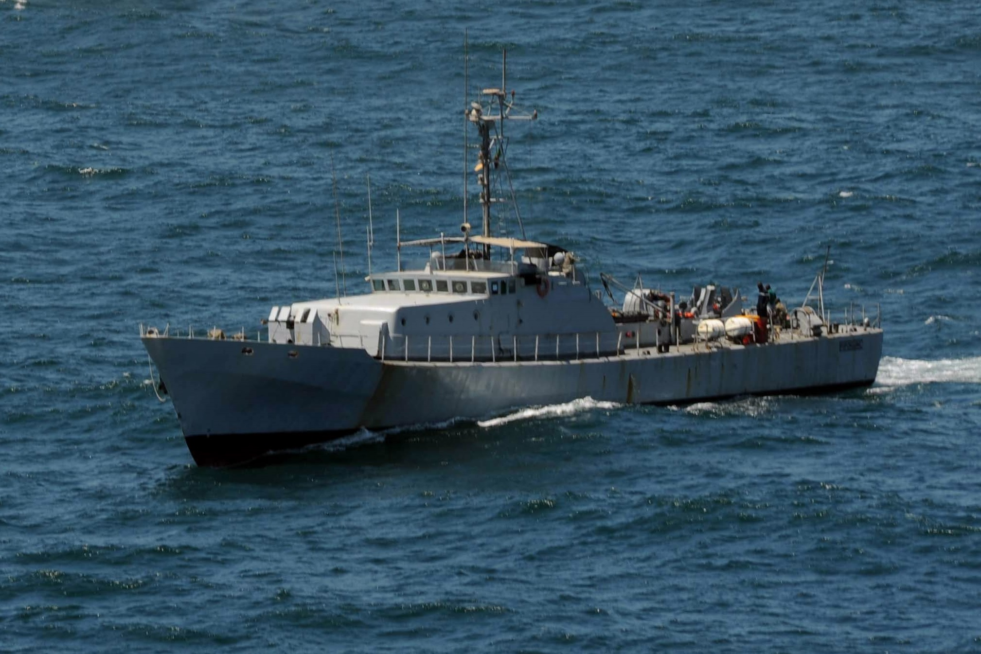 BSC Podor, patrouilleur côtier sénégalais, en mars 2013.